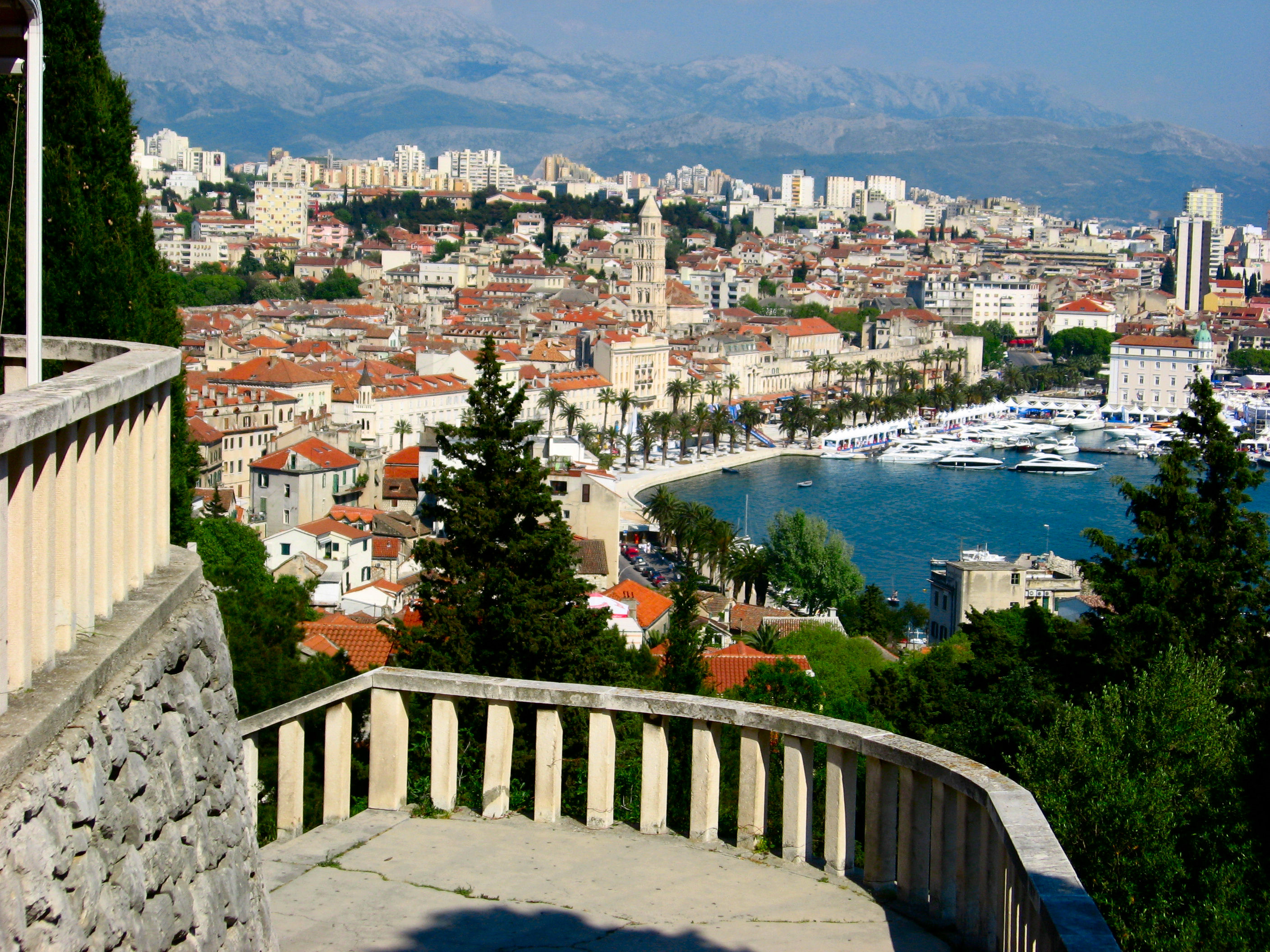 Pogled s marjanske vidilice